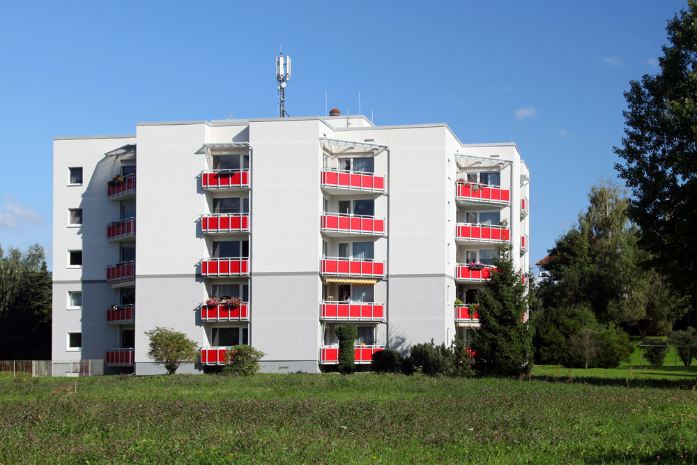 saniertes Zwölfeckhaus in Radeberg